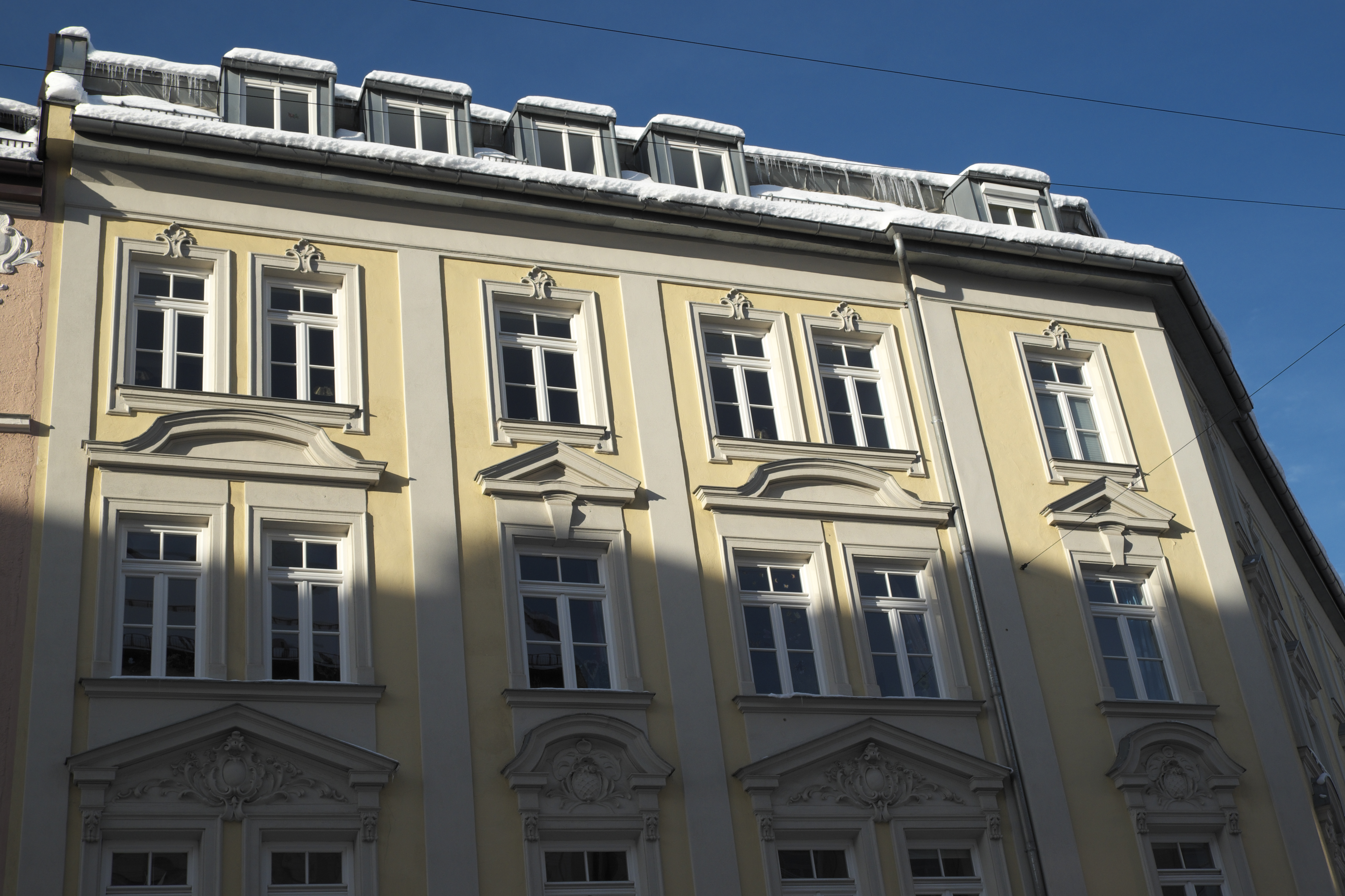 Mietshaus in der Breisacher Straße 10 in Haidhausen im Stadtbezirk Au-Haidhausen in München (Bayern/Deutschland), 1896–97 von Hans Thaler erbaut